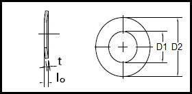 DIN 2093